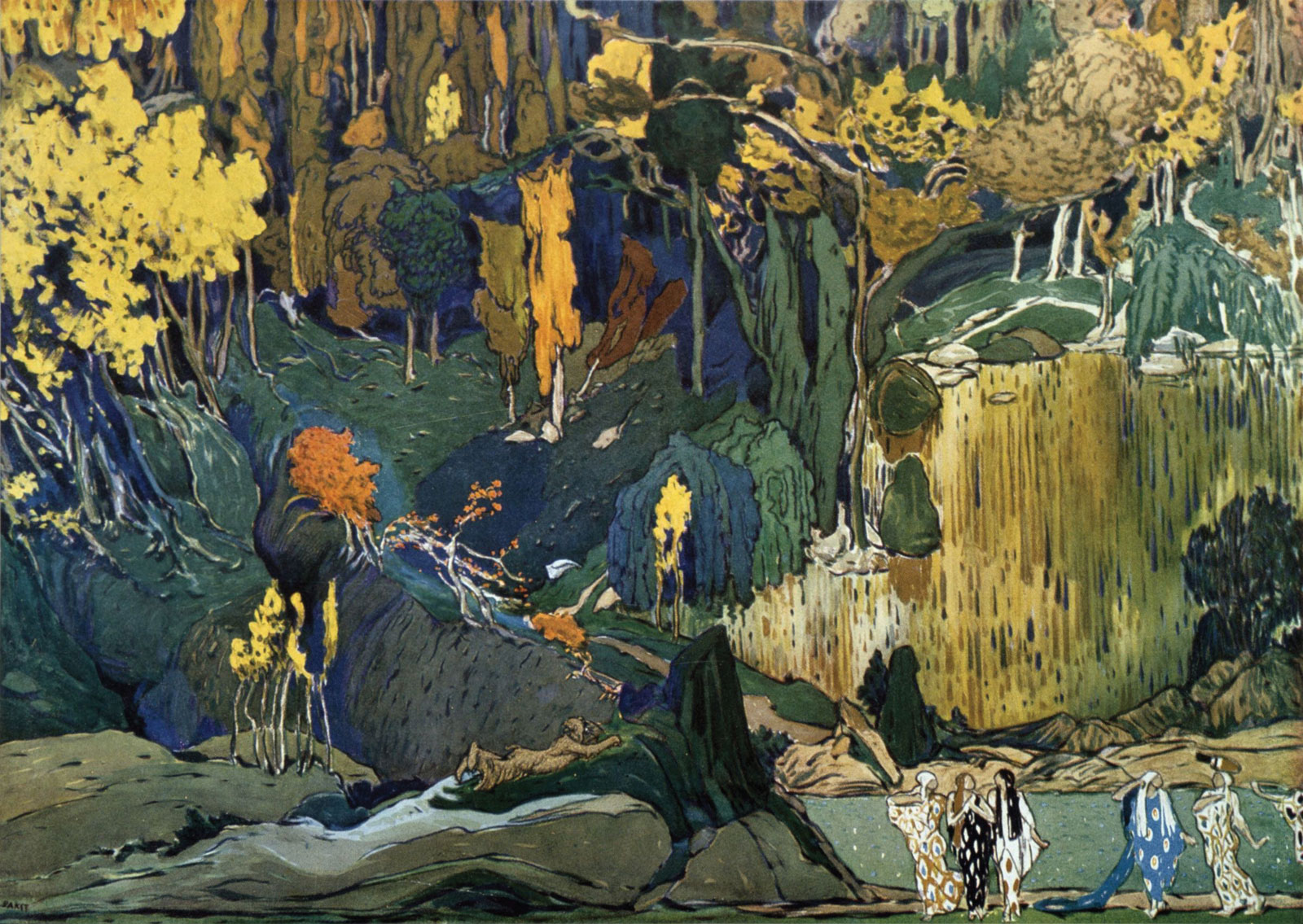 Эскиз декорации к балету «Послеполуденный отдых фавна». 1911